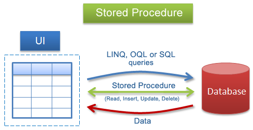 Монгол: Процедур түүн дээрх үйлдэл